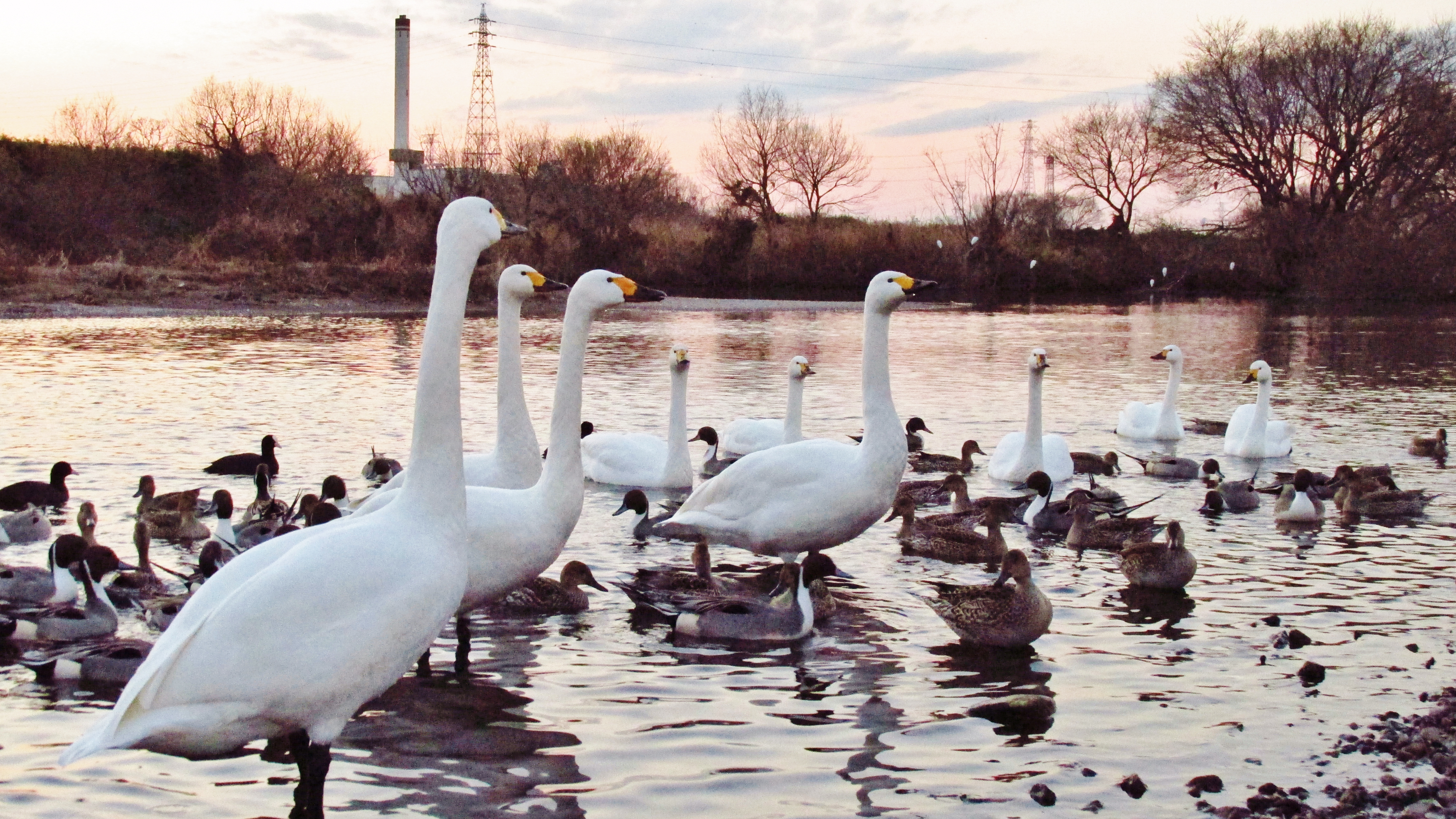 初冬、浅瀬に多くの渡り鳥が飛来し、越冬する（コハクチョウ、マガモ。対岸の白いハンカチのような物体はダイサギの群れ）。